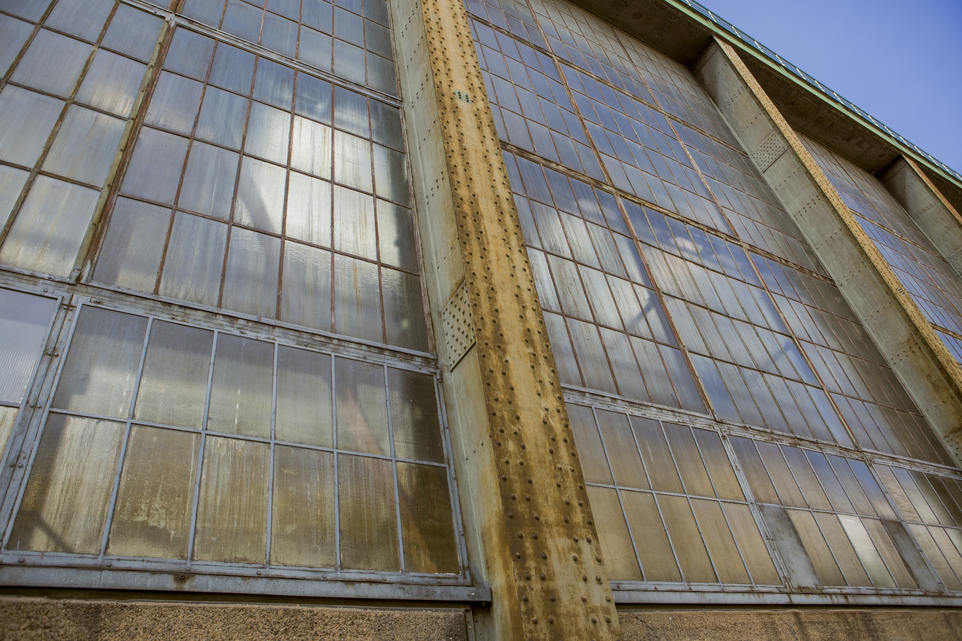 Union-Elektricitäts-Gesellschaft, später AEG-Turbinenfabrik / Detail Turbinenhalle von Peter Behrens Huttenstraße 12–16 BerlichingenstraßeThis is a photograph of an architectural monument.